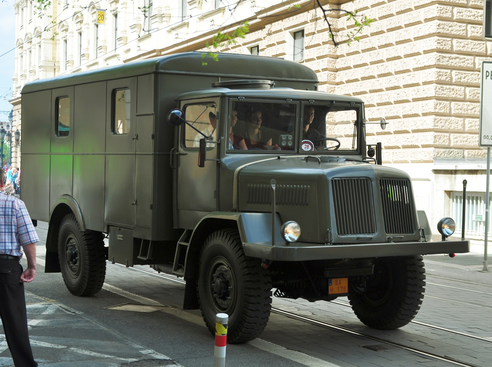 Prvomájová Veterán Tatra Raly Bratislava